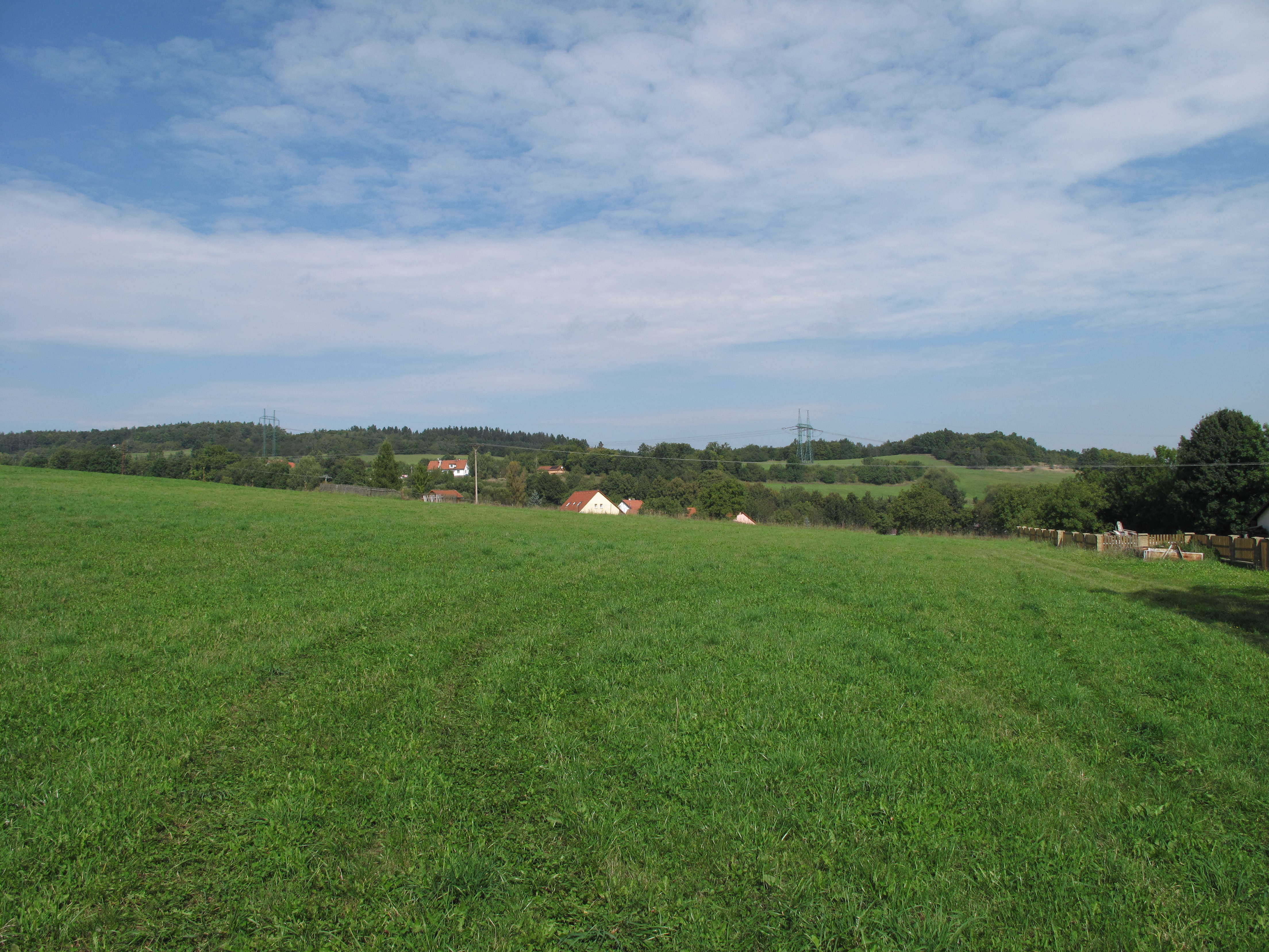 Třebsín od západu. Okres Benešov, Česká republika.